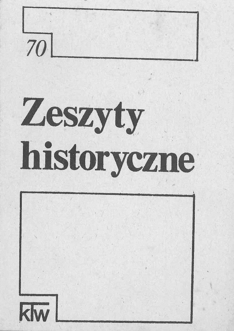 Okładka bezdebitowego wydawnictwa "Zeszyty literackie" wydawanego przez Krakowskie Towarzystwo Wydawnicze